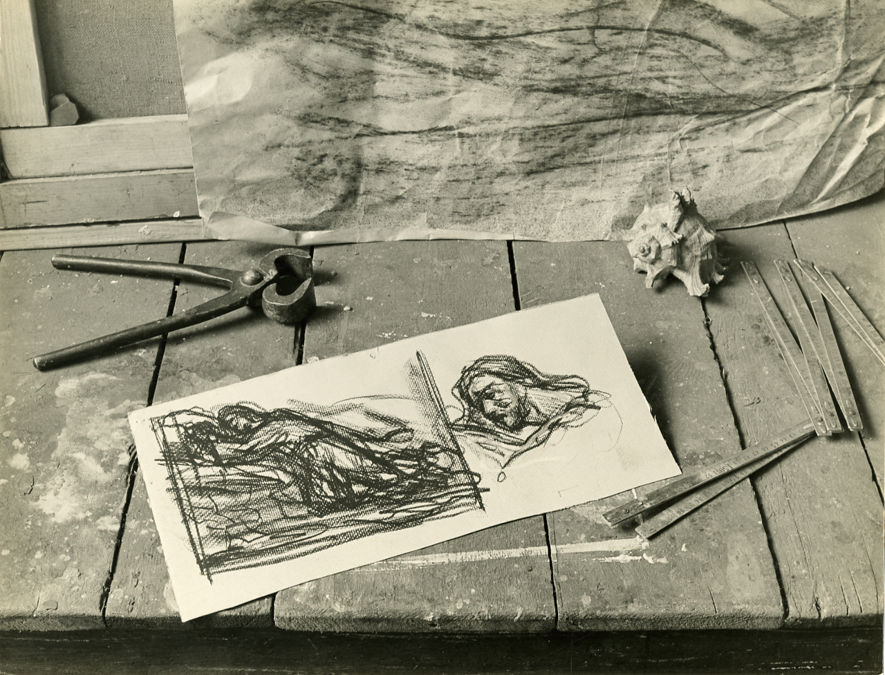 Serie fotografica : Vence, 1963 / Paolo Monti. - Stampe: 10 : Positivo b/n, gelatina bromuro d'argento/ carta, 24x30, 30x40. - ((Al verso delle stampe iscrizioni didascaliche e documentaria manoscritte a matita e a penna: "Ve/ 1953", "Atelier Cassinari (Milano)", "1950/ Composizioni/ Particolare del felze/ di gondola", "Ve/ Forme/ 1948", "Jean Dubuffet/ 1960"; timbri a inchiostro con copyright (Cannaregio - Venezia e Via Colonna e Corso Sempione - Milano); timbro a inchiostro di collezione?: "F.I.A.F./ Federazione Italiana Associazioni Fotografiche". - Sul coperchio della scatola iscrizione didascalica manoscritta a pennarello nero: "Composizioni - studi - soffitte". - Partecipazione ad una mostra (?) con stampa b/n 30x40 cm intitolata "Forme", datata 1948 (cfr. timbro al verso: "F.I.A.F."). - Fonte: Monografia di Chiesa Butazzi, Grazietta: Venezia e la sua gondola, Milano, Görlich (1974)